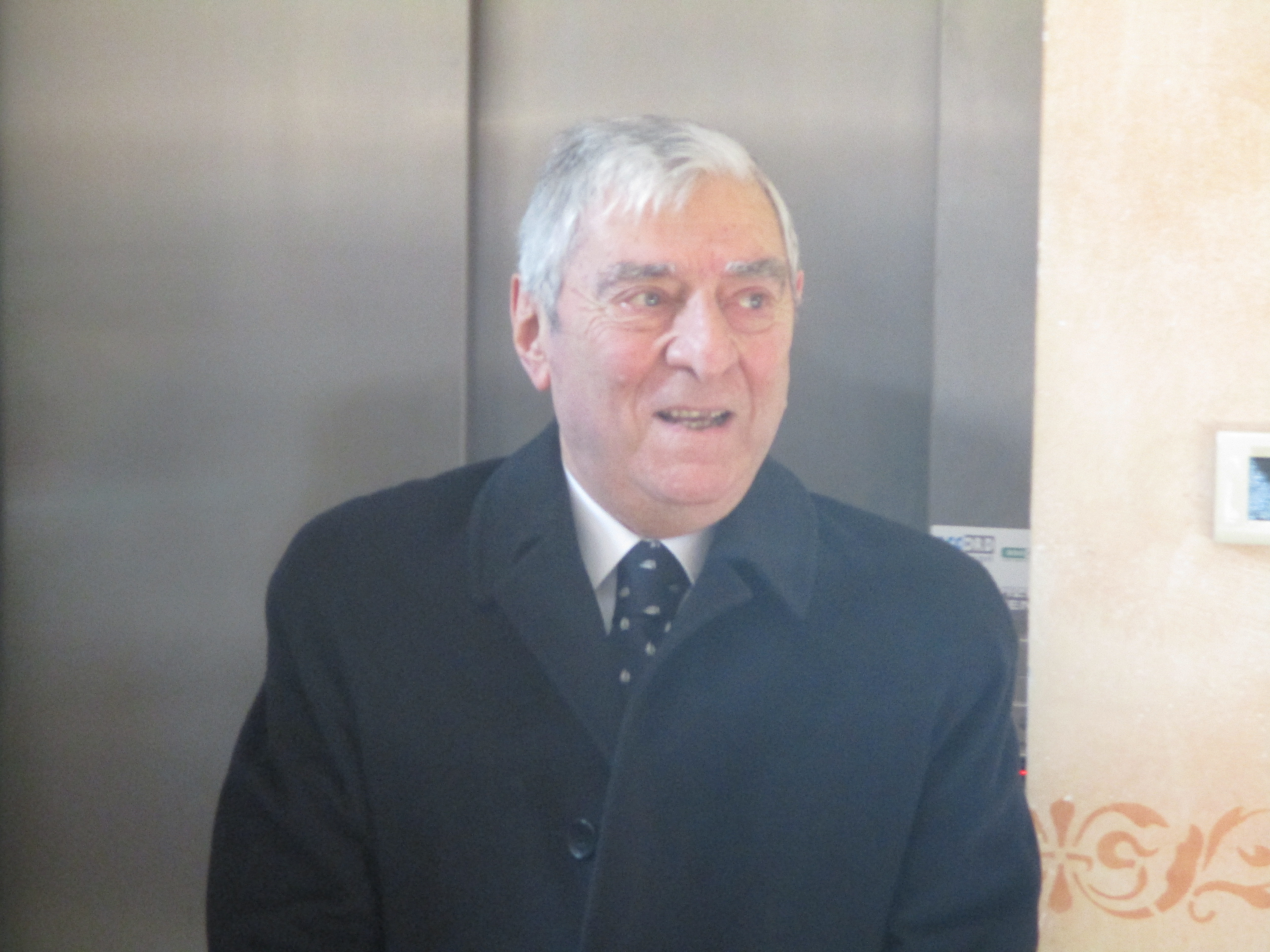 Natalino Irti